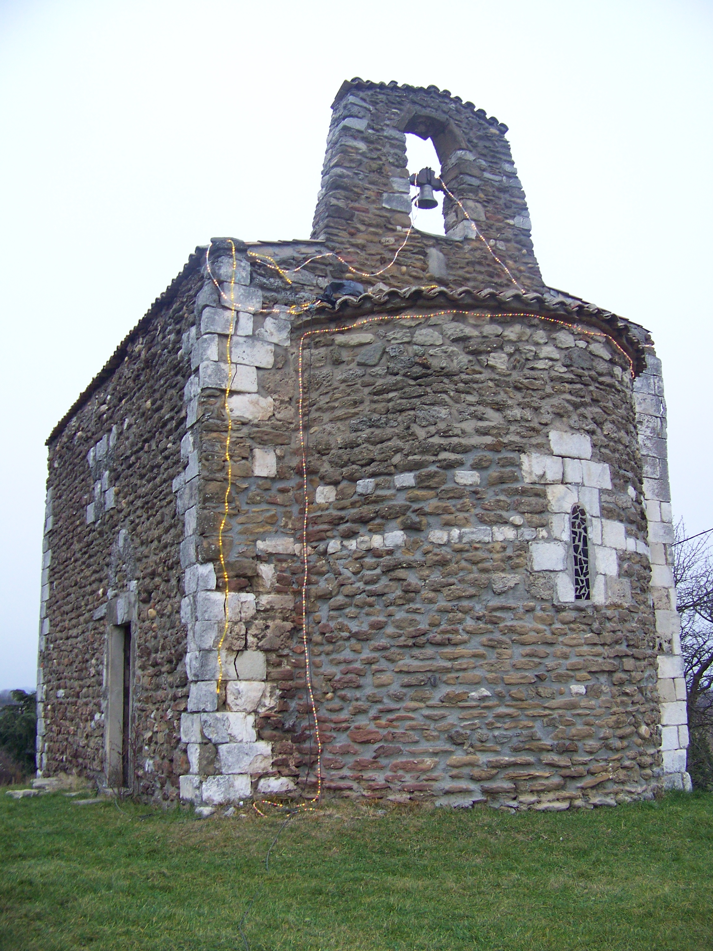 Saint Maxime le 8 12 2007 à retrouvé sa cloche après rénovation